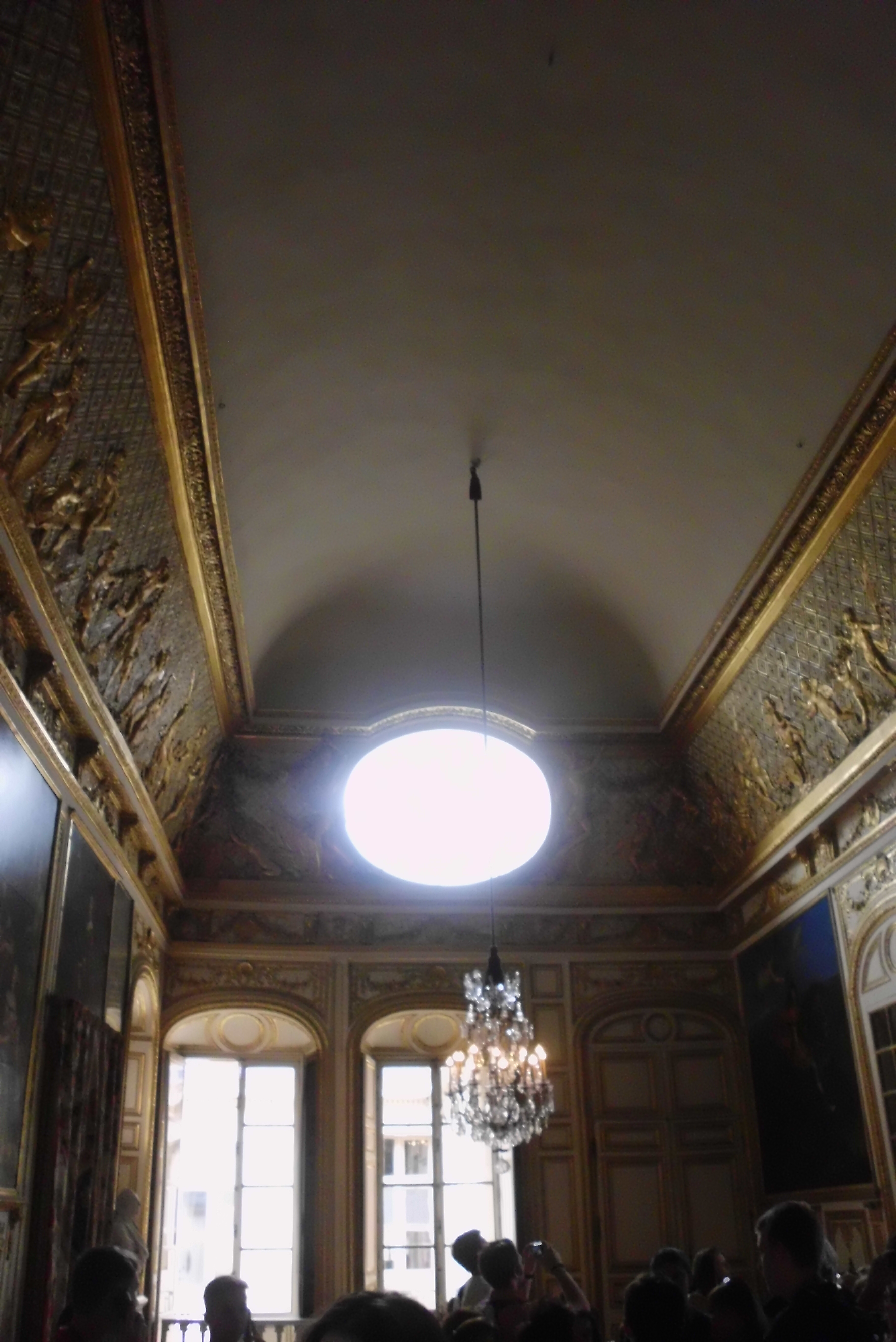 Wersal w 2013